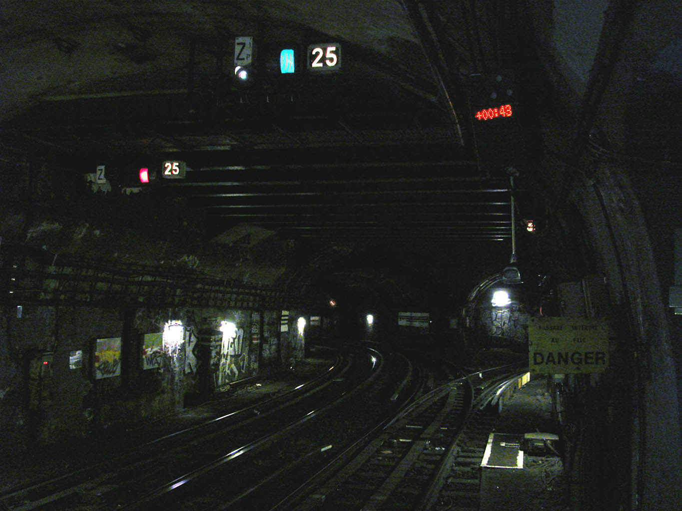 Bifurcation de la ligne 13 du métro de Paris à la station La Fourche, France.